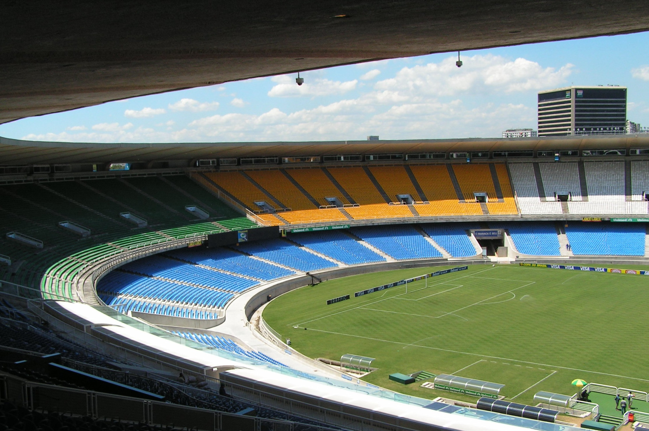 Stadion Maracanã w Rio de Janeiro (strona lewa)